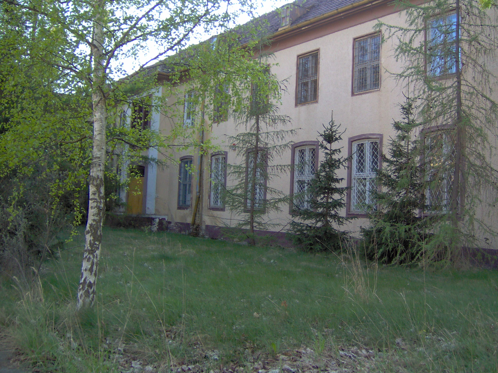 Koszary w Żarach sztab 42pz.